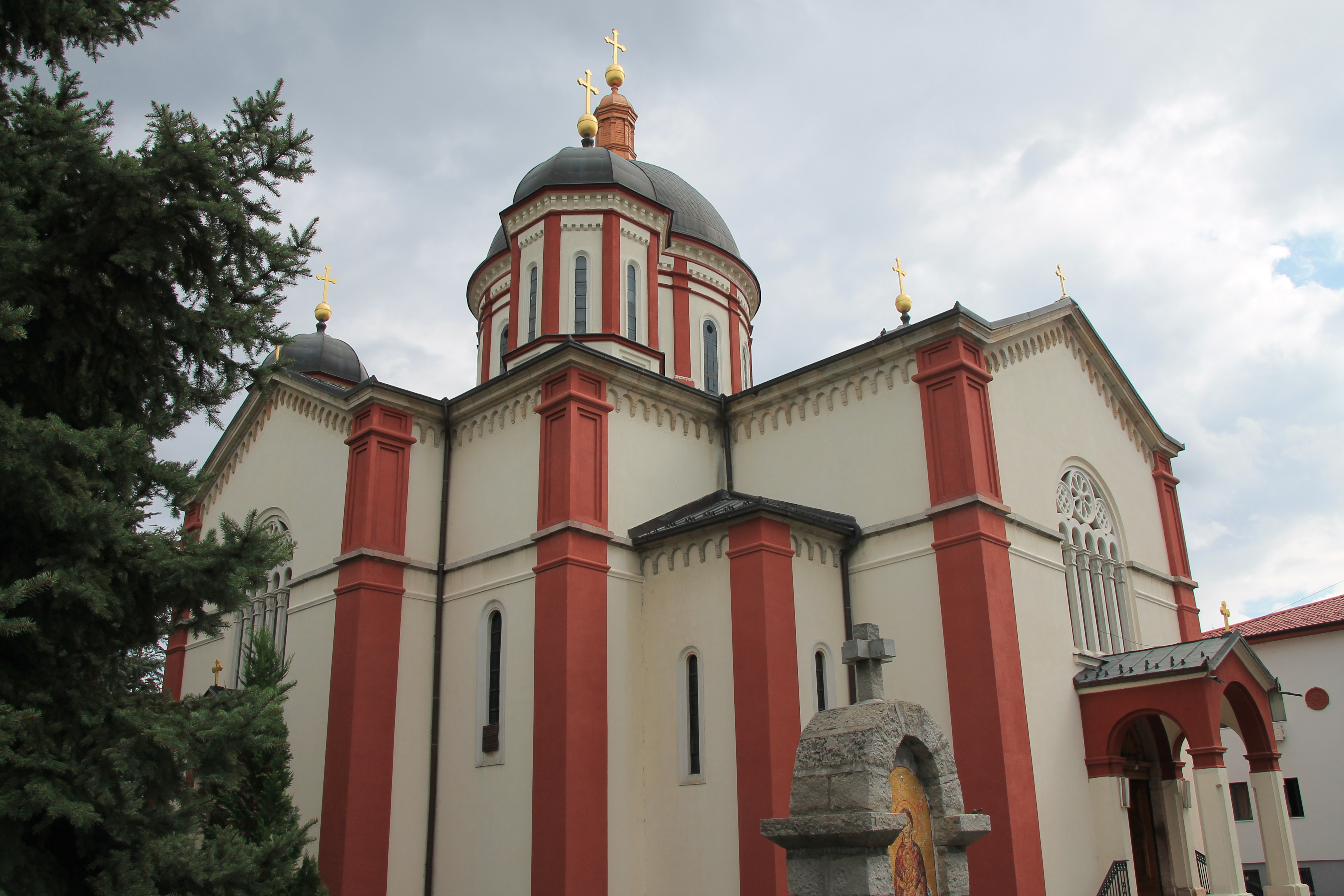 Saborna crkva u Kragujevcu